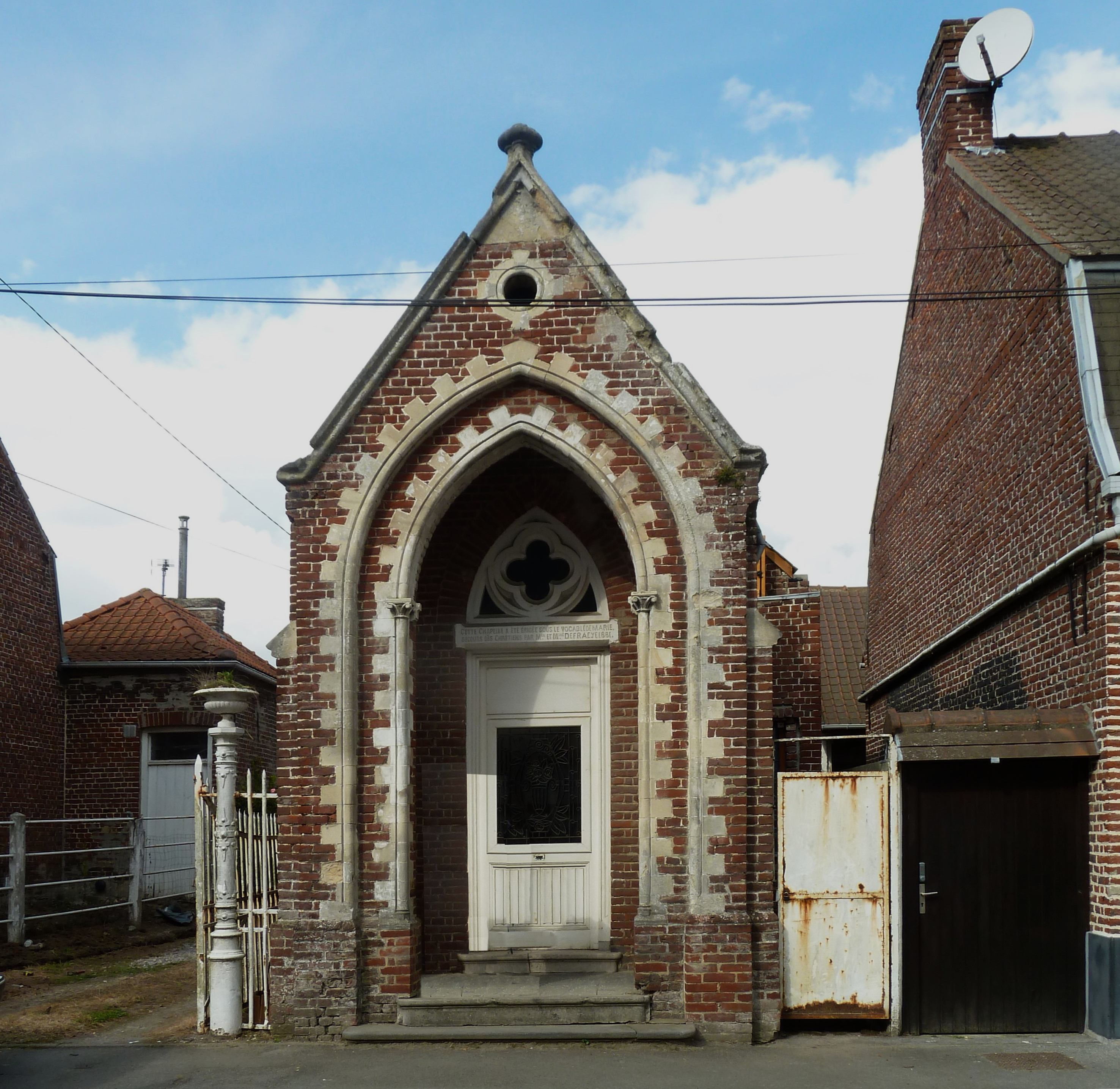 Chapelle Marie secours des chrétiens Arnèke dans le Nord Nord-Pas-de-Calais.- France.